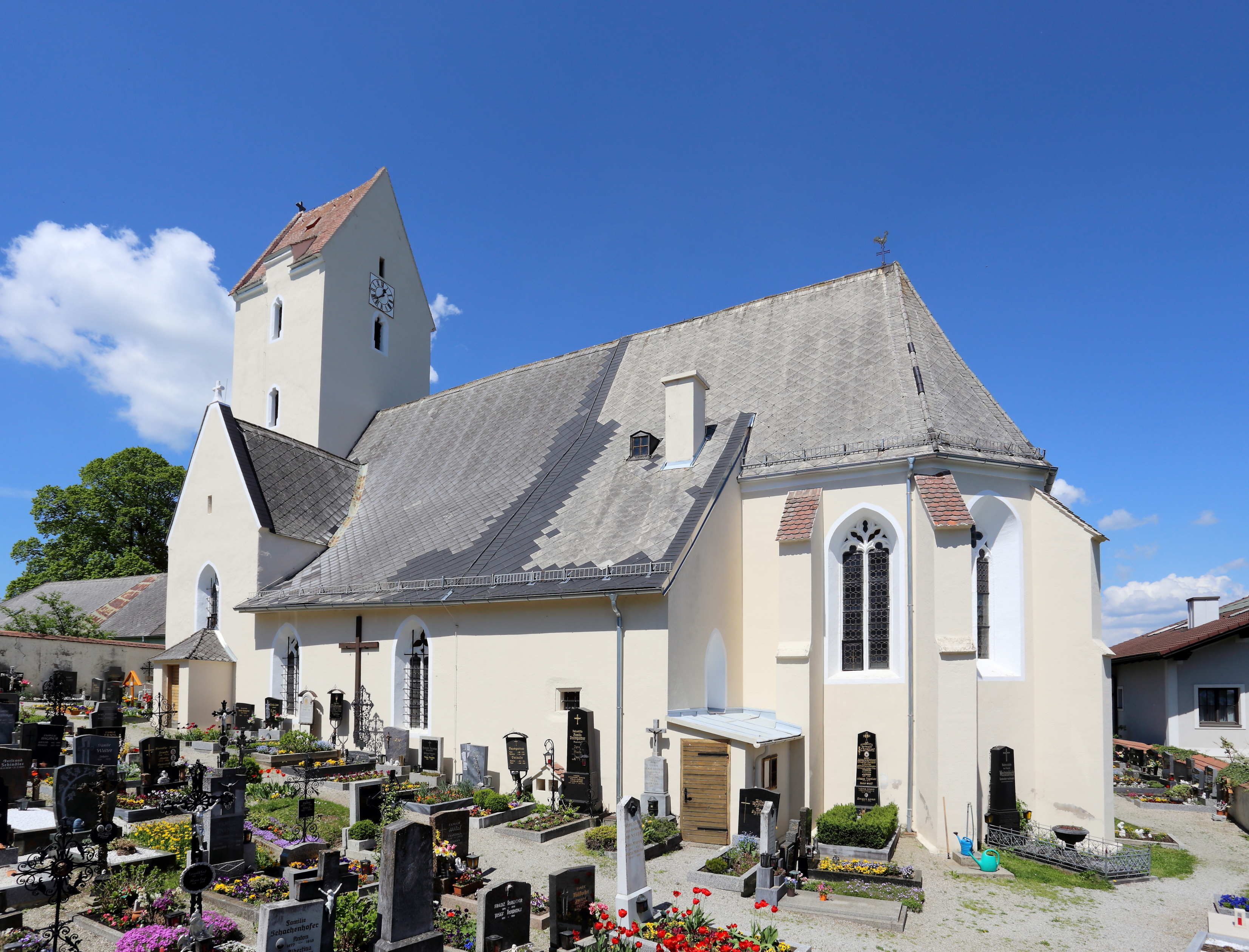 Katholische Pfarrkirche Mariae Himmelfahrt in Neukirchen am Ostrong, ein Ortsteil der niederösterreichischen Marktgemeinde Pöggstall.